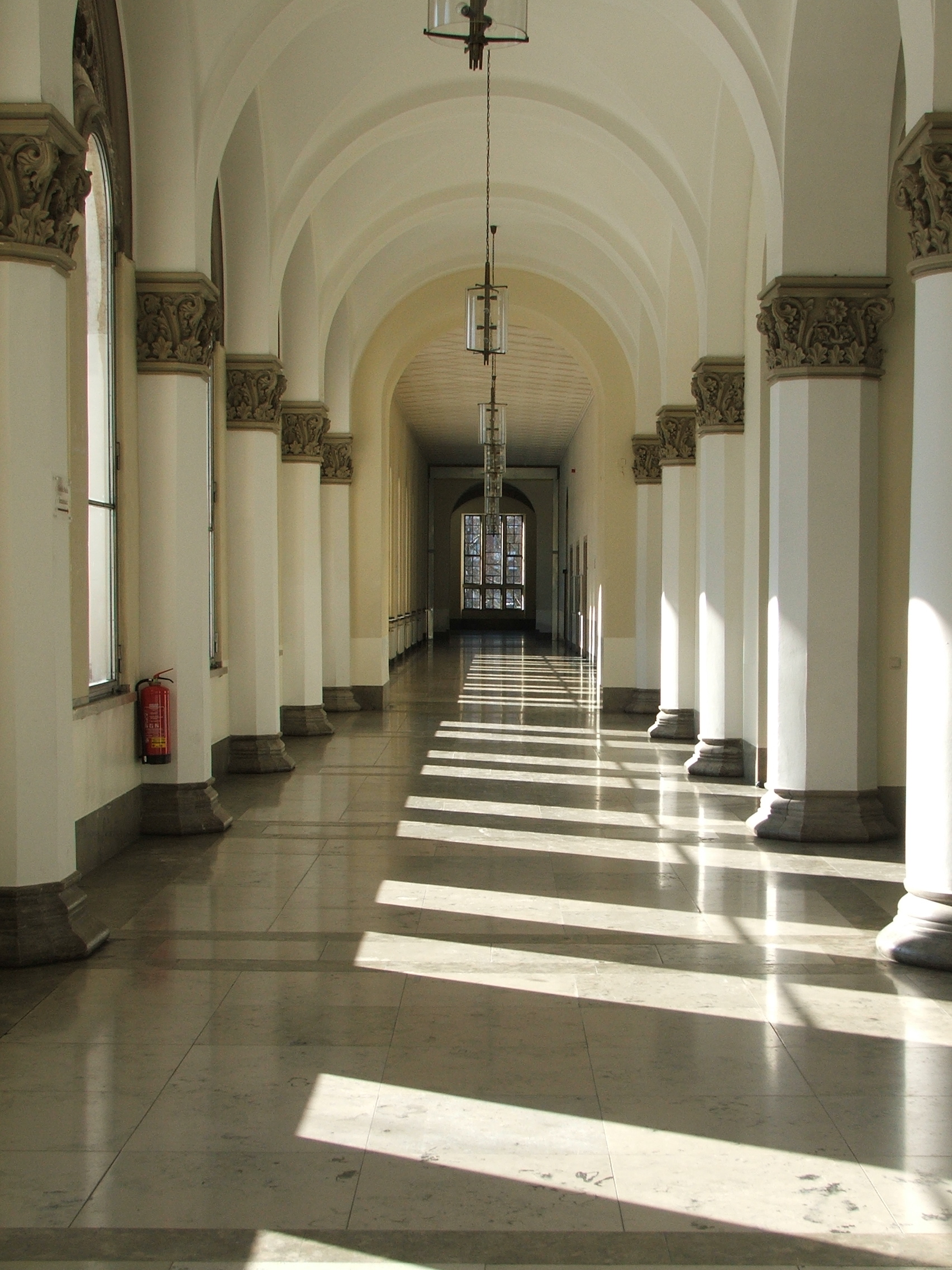 Gang im Uni-Hauptgebäude der Ludwig-Maximilians-Universität München